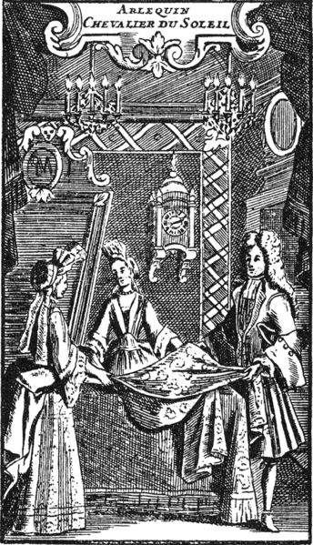 Illustration of Anne Mauduit de Fatouville's Arlequin chevalier du soleil